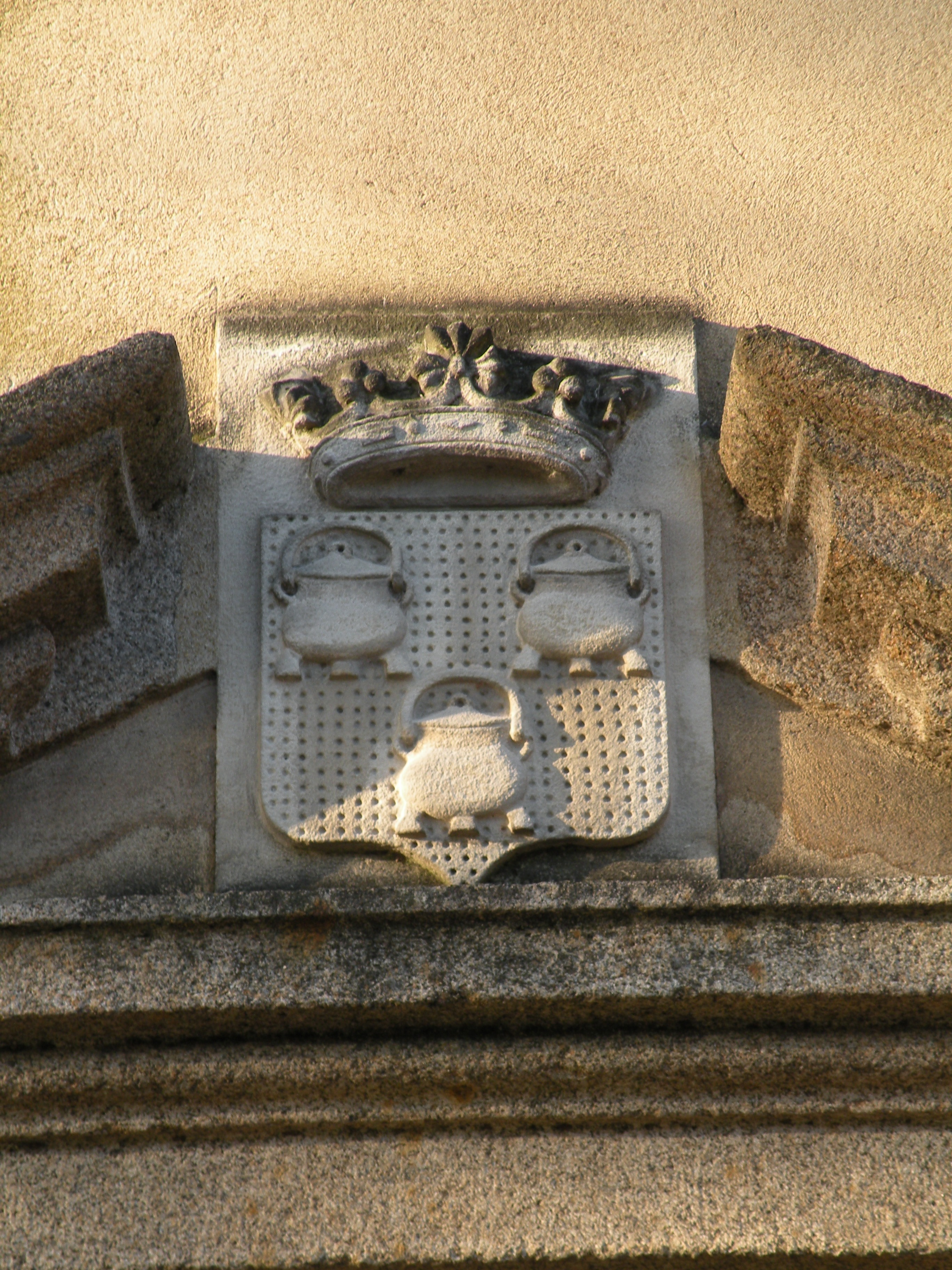 Blason de la famille de Montbourcher sur le fronton de l’hôtel Montbourcher, 30 place des Lices à Rennes.